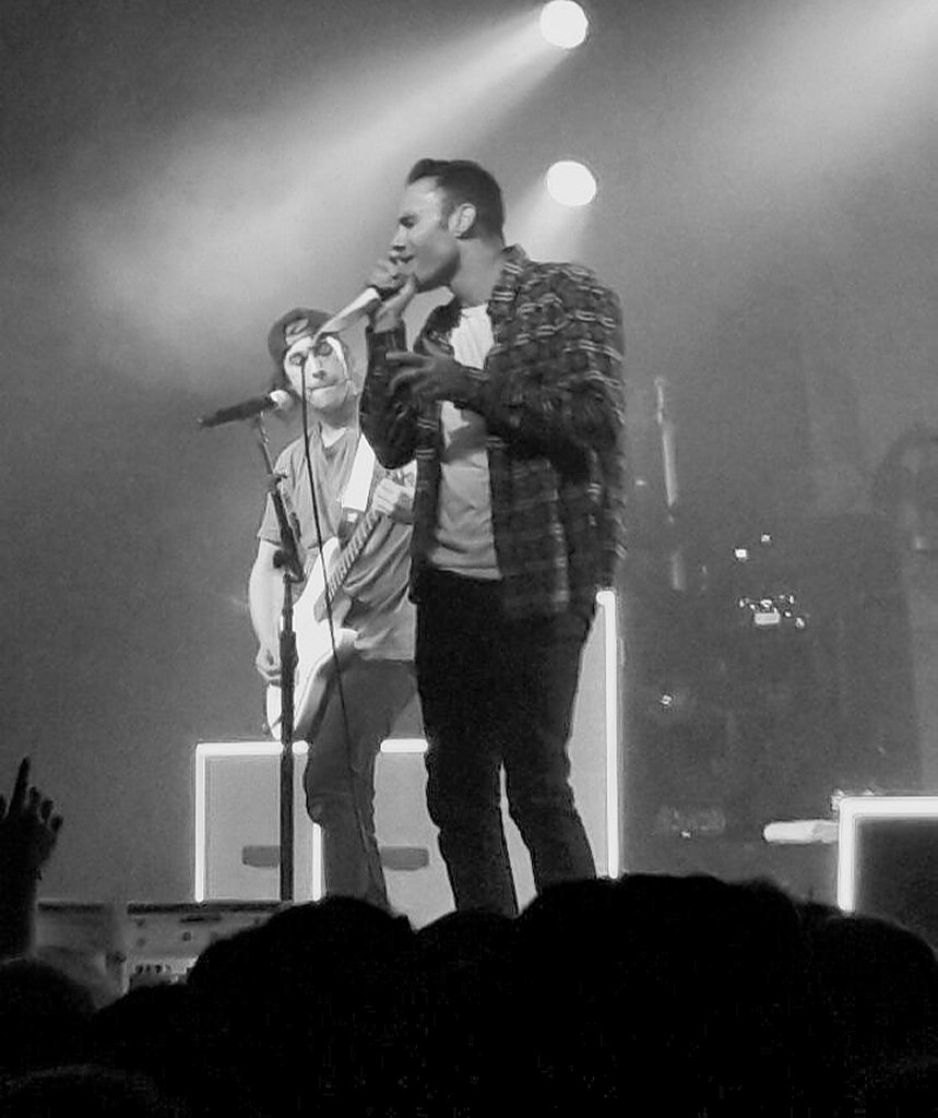 Jason Butler spielt mit Pierce The Veil das Lied Tangled in the Great Escape in der Live Music Hall in Köln, 2016.